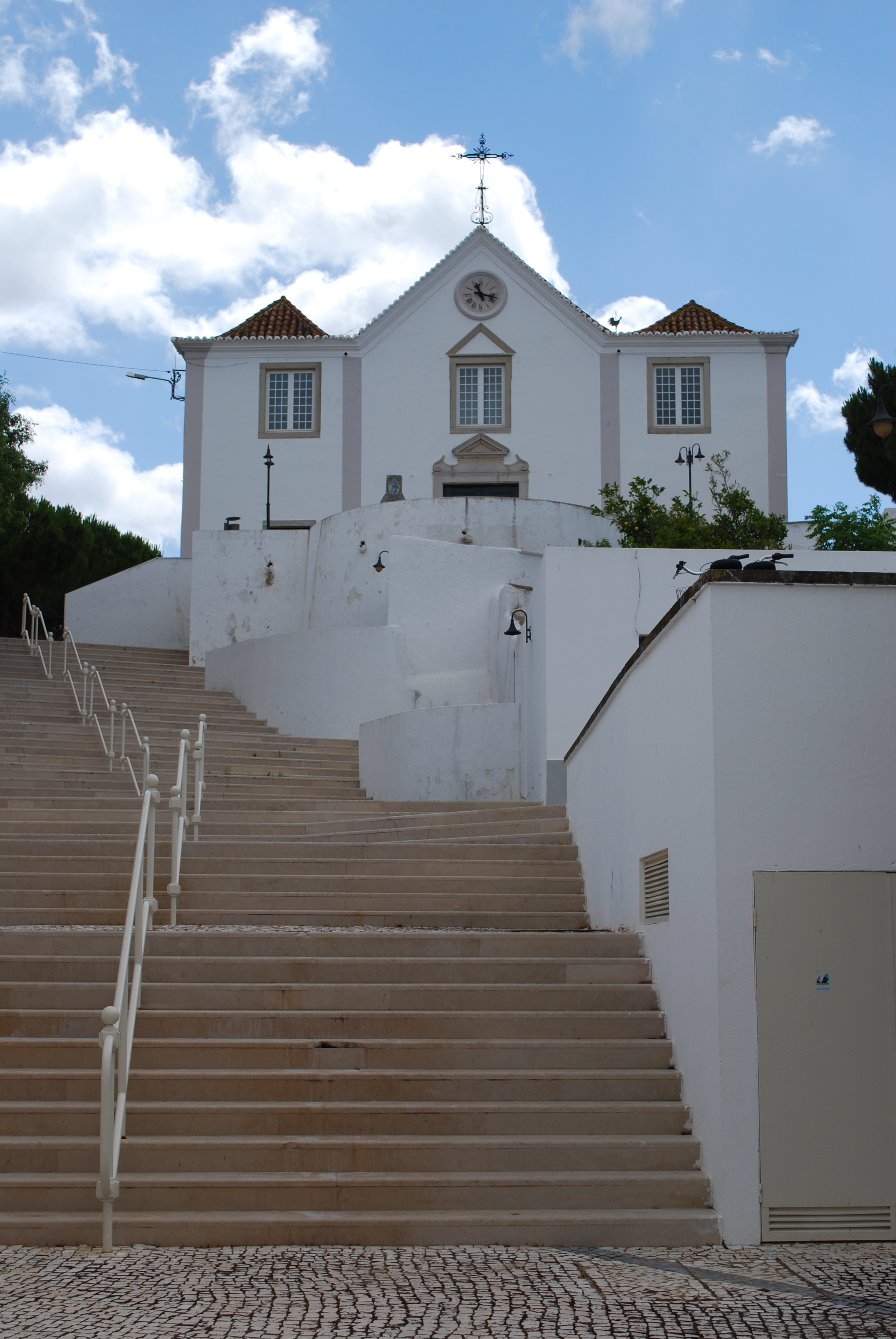 Igreja Paroquial de Nossa Senhora dos Mártires This file was uploaded for Wiki Loves Monuments in Portugal with the unique identifier 97008410.